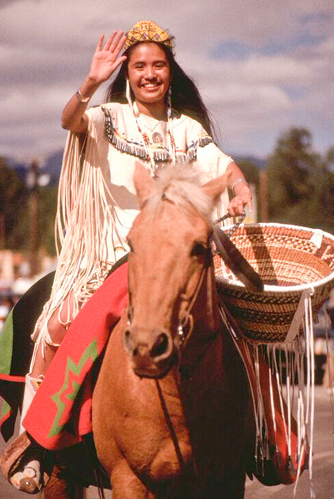 Mescalero-Indianerin bei einem Rodeo, Billy the Kid Trail, New Mexico